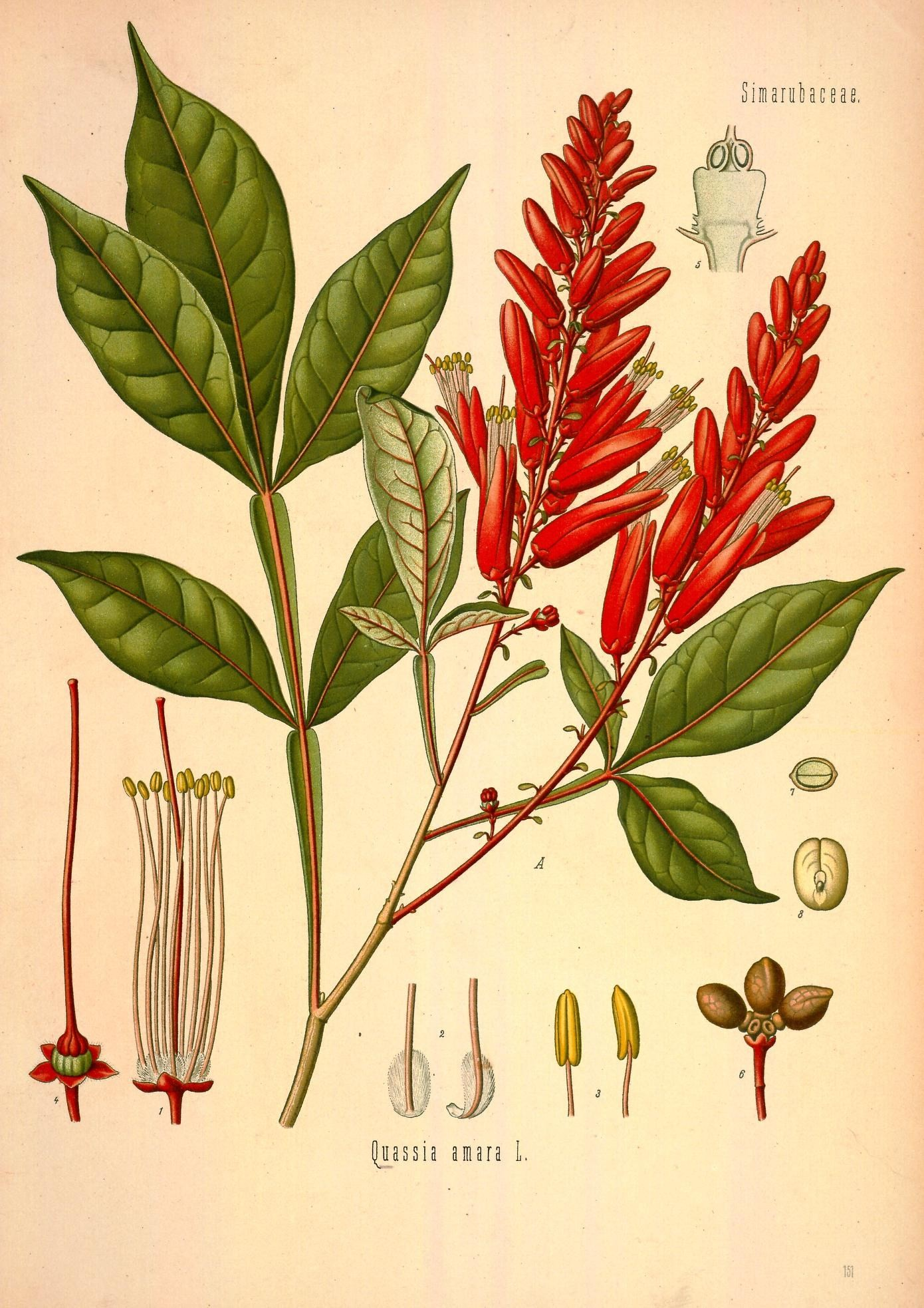 Bitterholzbaum. A blühender Zweig, nat. Grösse; 1 Blüthe ohne Krone, vergrössert; 2 Basis der Staubgefässe, desgl.; 3 Staubbeutel von verschiedenen Seiten, desgl.; 4 Kelch mit Stempelträger und Stempel, desgl.; 5 unterer Theil dieser Figur im Längsschnitt, desgl.; 6 Früchte, nat. Grösse; 7 Samen im Quer- und Längsschnitt.